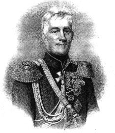 Лит. А. Мюнстера, СПБ. Imp. Lith. A. Munster (Editeur)